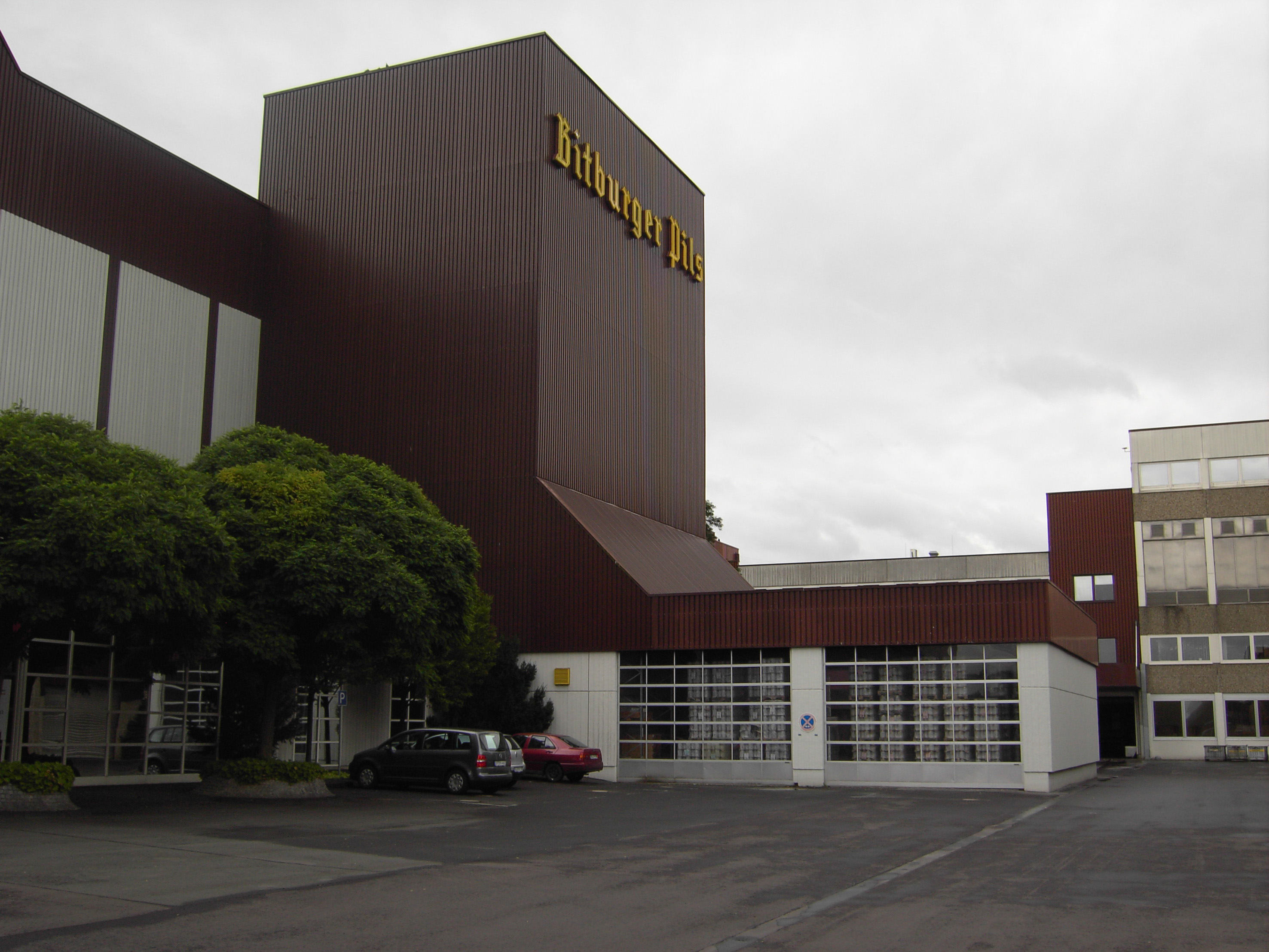 Bitburg - Nieuwe brouwerij in 2007